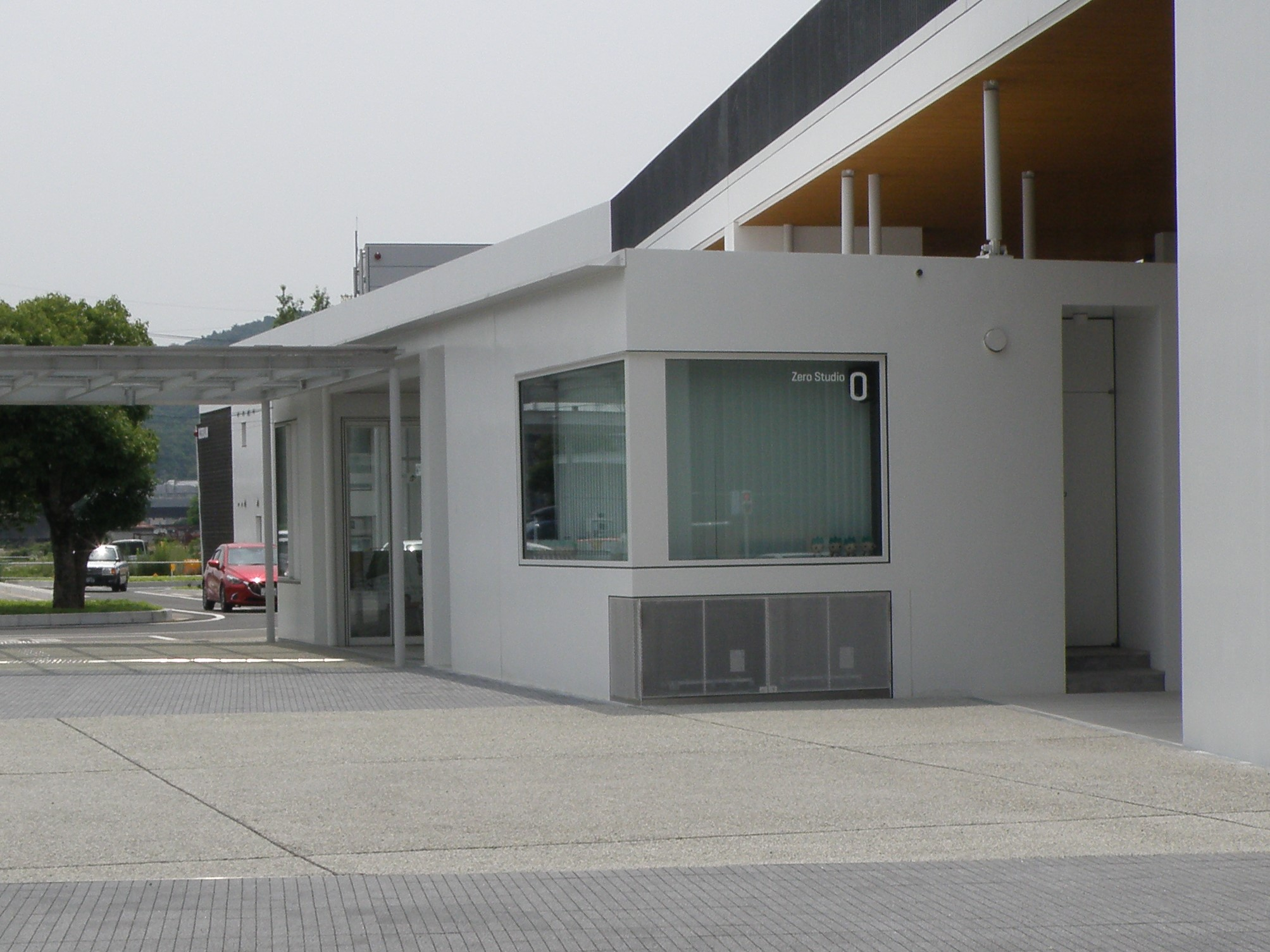 新山口駅北口に建設された、エフエム山口のサテライトスタジオ「ゼロスタジオ」